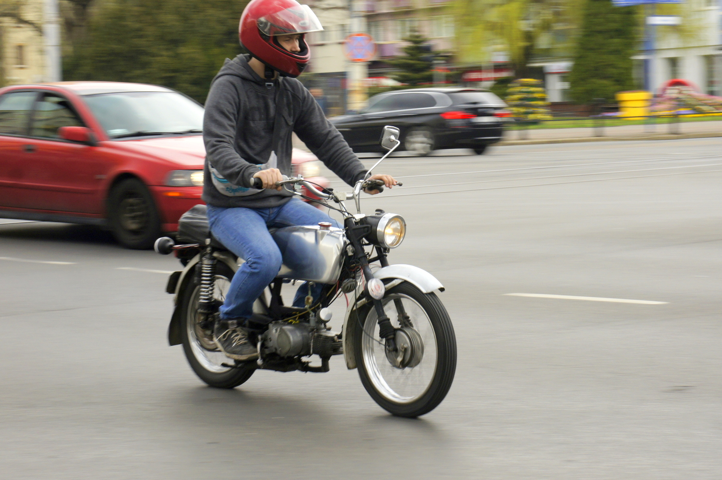 Jawa 50/23 - Mustang w ruchu ulicznym.